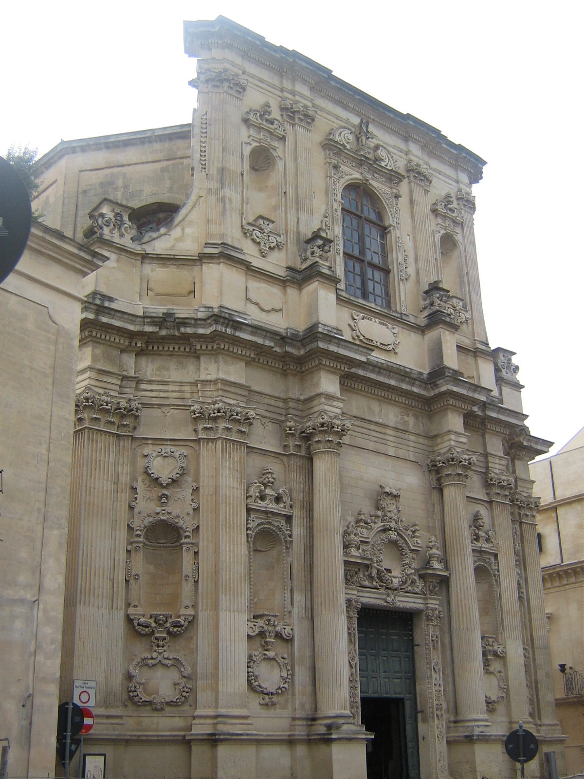 Chiesa di Santa Chiara opera di Giuseppe Cino